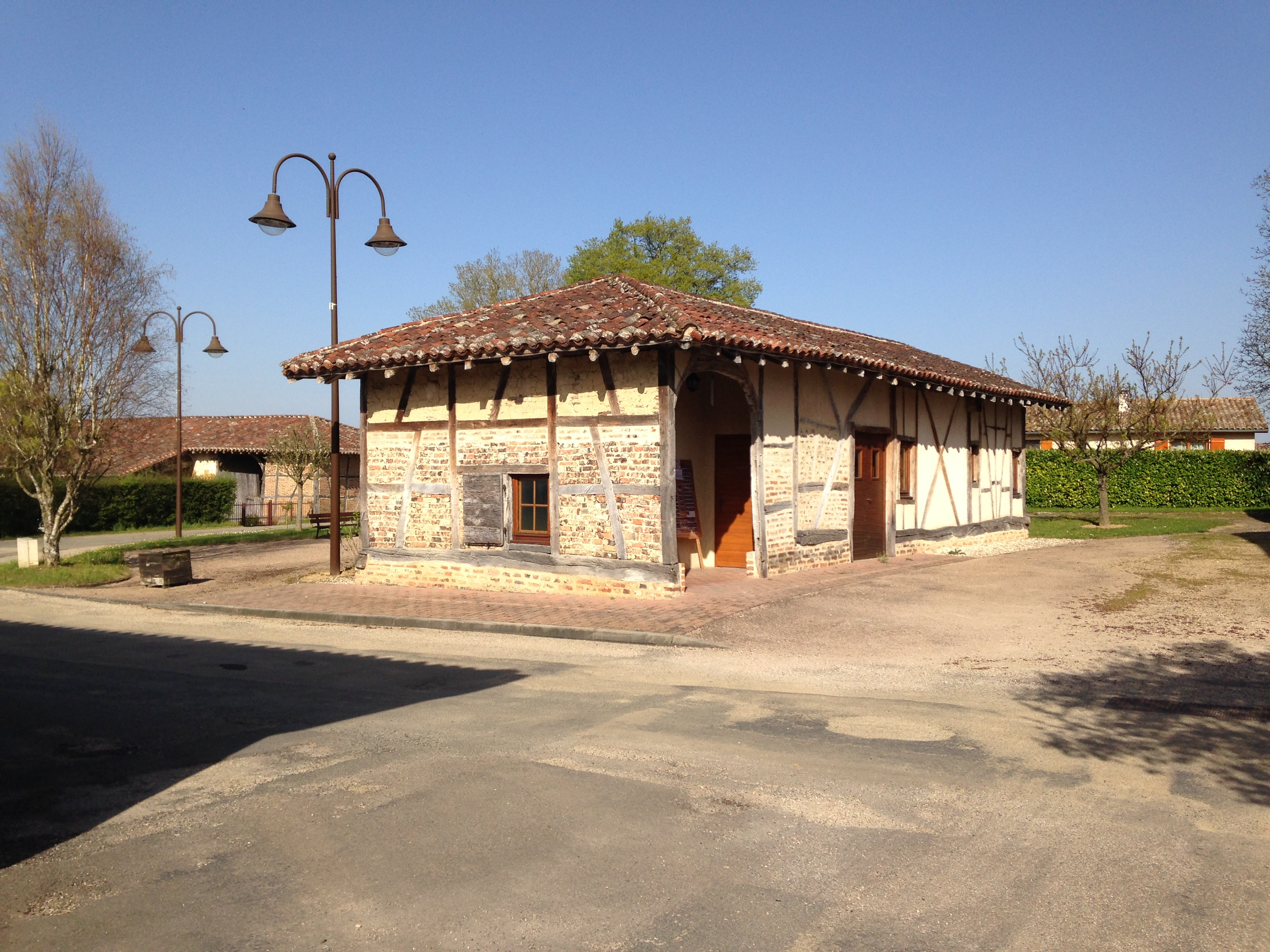 Bibliothèque communale et ancienne ferme en torchis et pans de bois du XVè siècle